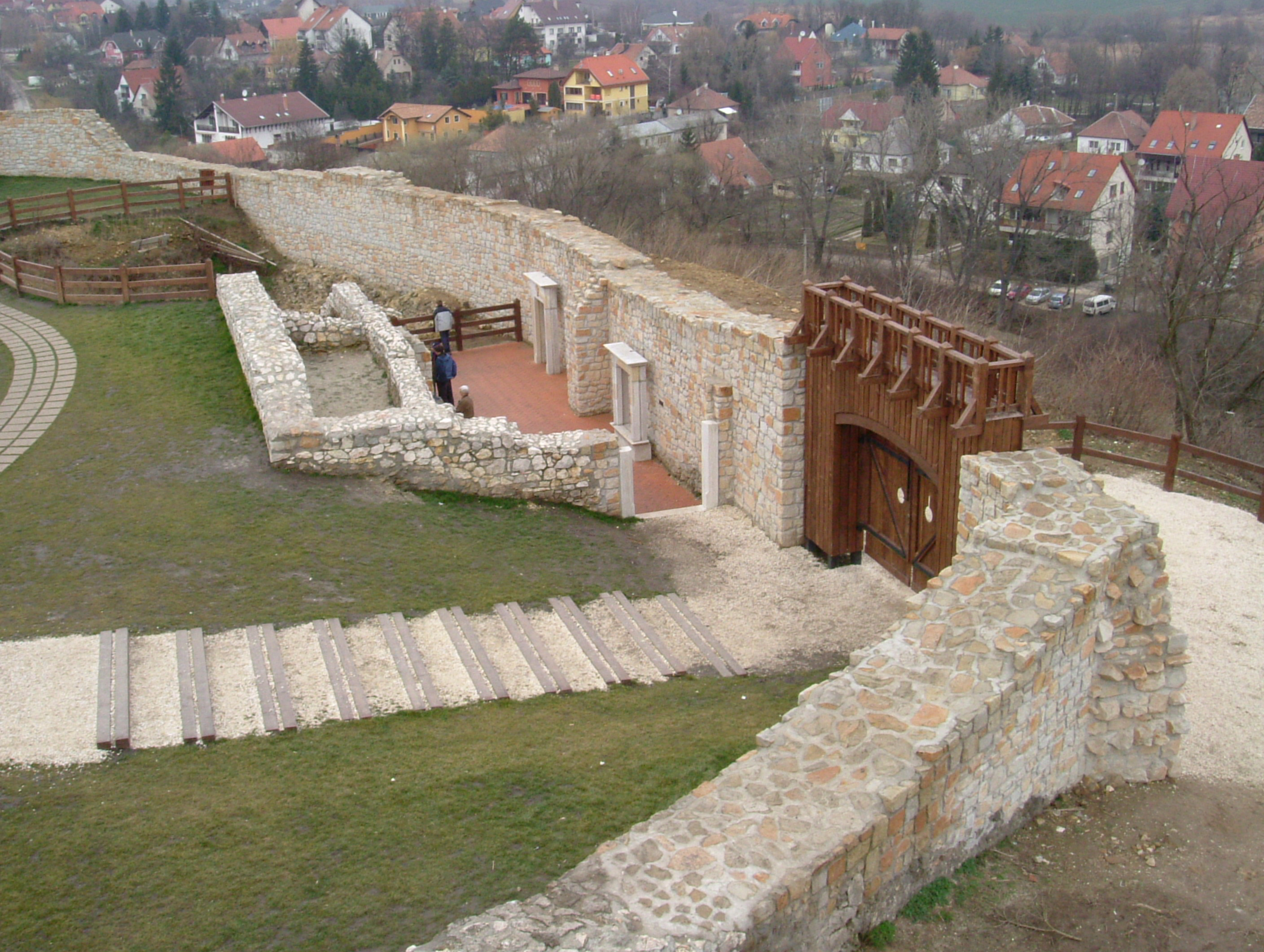 Szarkavár, Solymár, Hungary